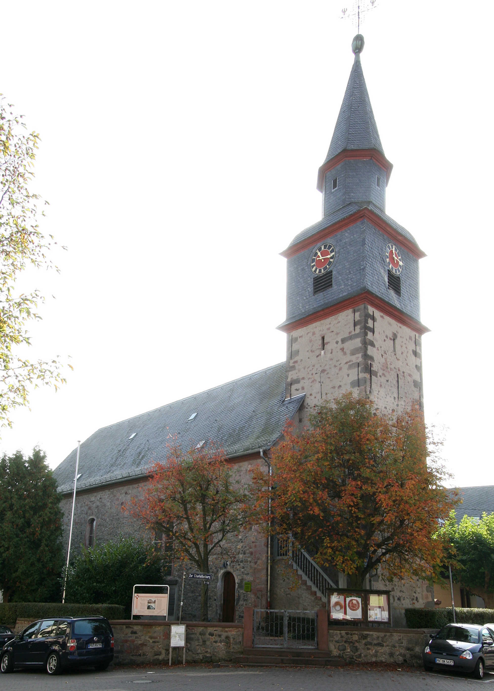 Evangelische Kirche in Nieder-Erlenbach, einem Stadtteil von Frankfurt am Main.